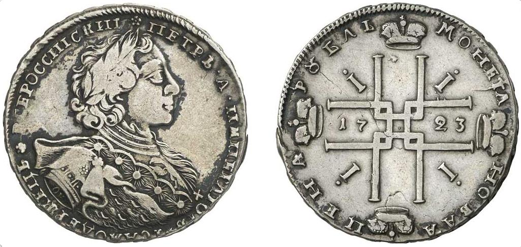 Pièce de 1 rouble en argent de 28,25 g aux armes de Pierre 1er de Russie, 1723 Légende revers : MOHETA HOBAA ЦEHA P[OУ]БЛЬ = Monnaie neuve du prix de 1 rouble